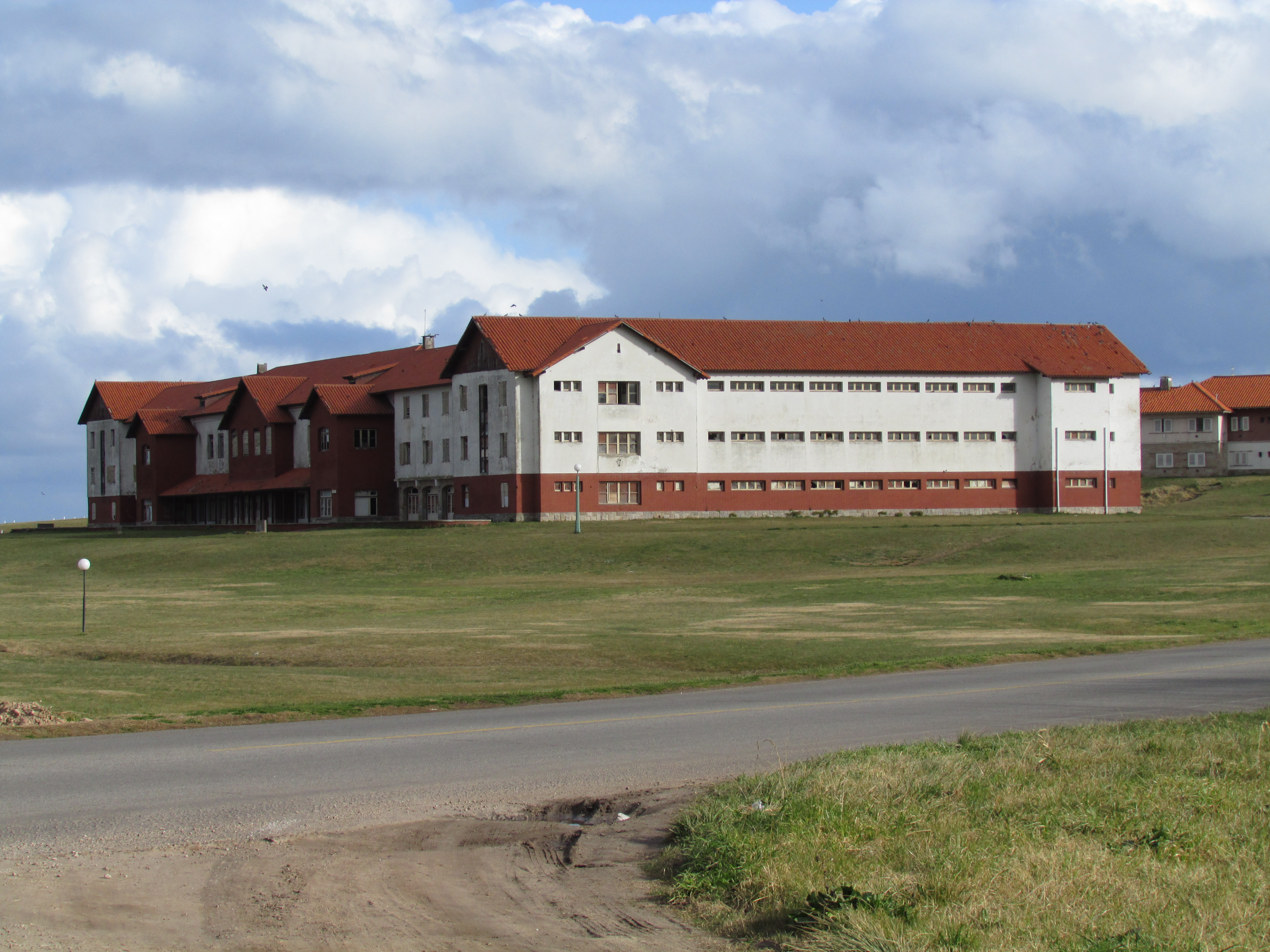 Hotel 3 de la Unidad Turística Chapadmalal en el partido de General Pueyrredón, provincia de Buenos Aires, Argentina.